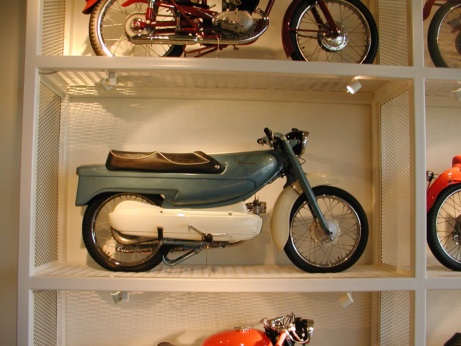 Parilla Slughi 99 del 1959 JurassicParts